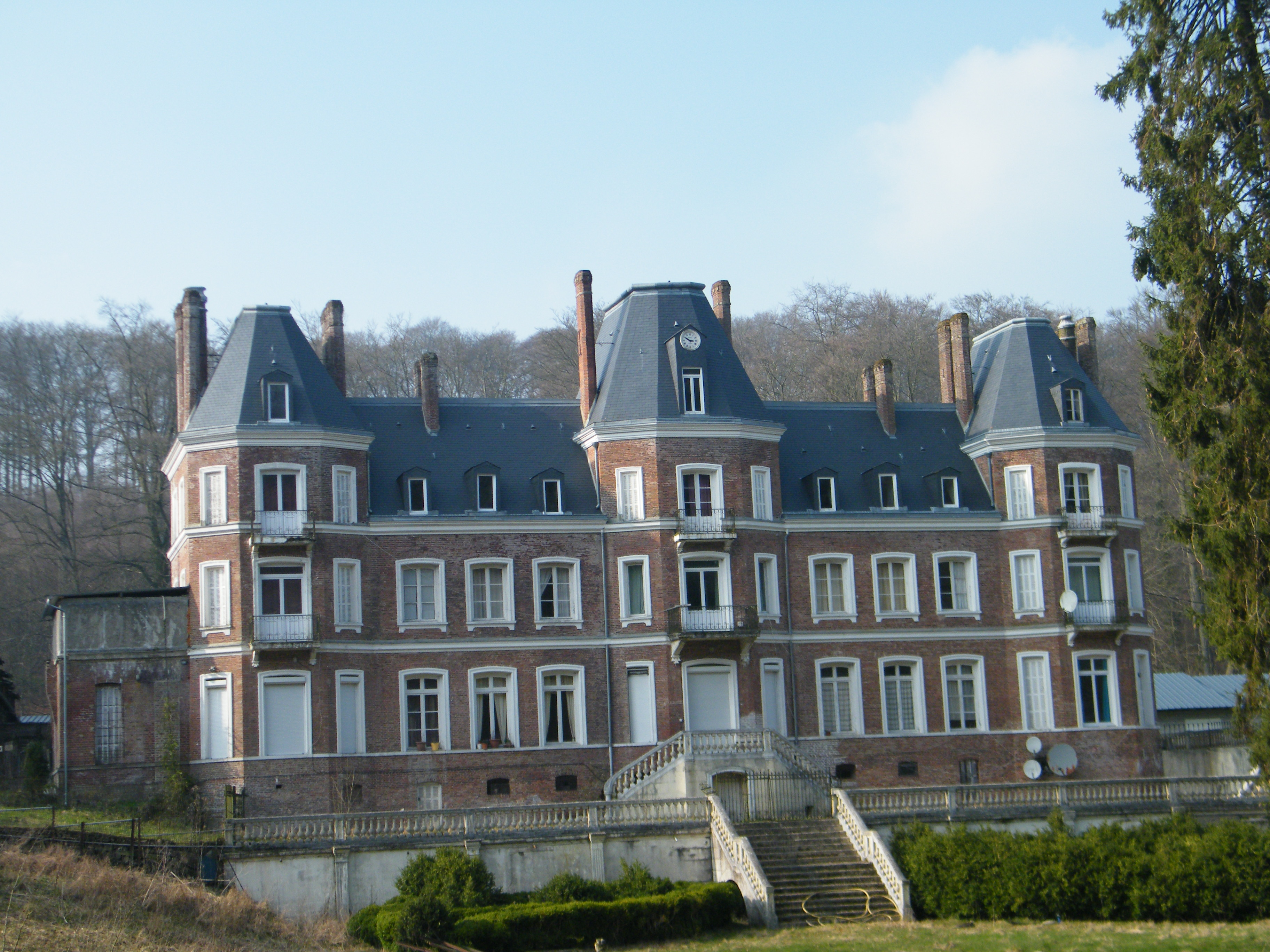 Guerville (76)-La Grande Vallée